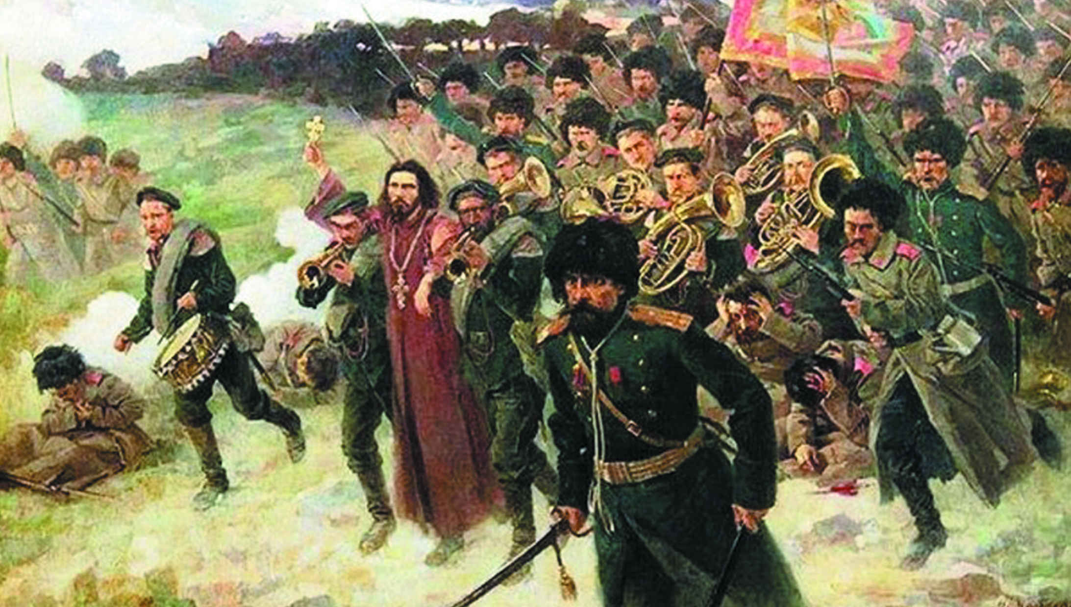 Полковой священник Стефан Щербаковский, дважды раненый, идет с крестом впереди 11-го Восточно-Сибирского стрелкового полка в бою под Тюрен-ченом. Картина художника М. Л. Маймона.